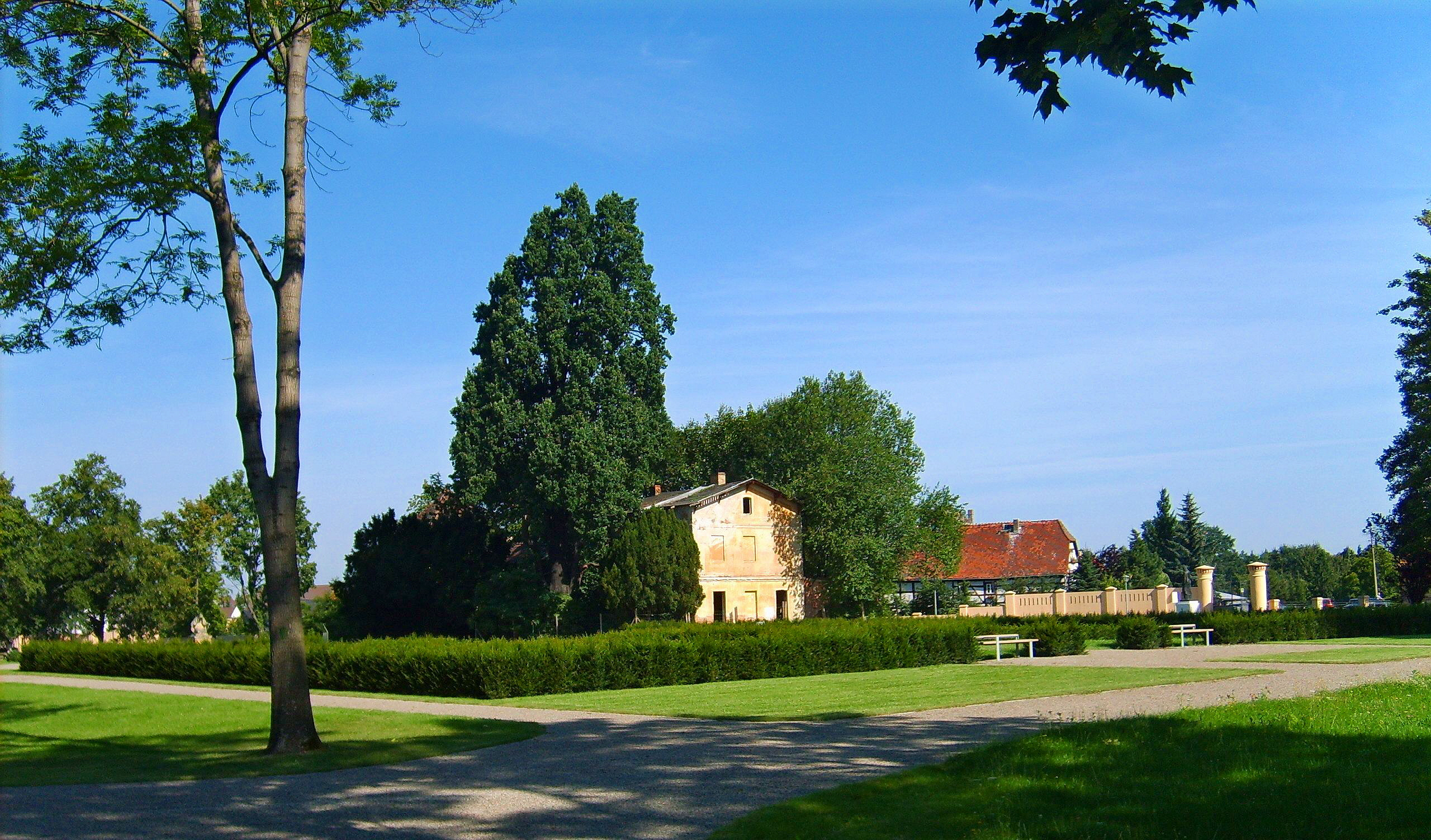 Einstiger Standort des Schlosses Mückenberg im Schlosspark Lauchhammer-West.